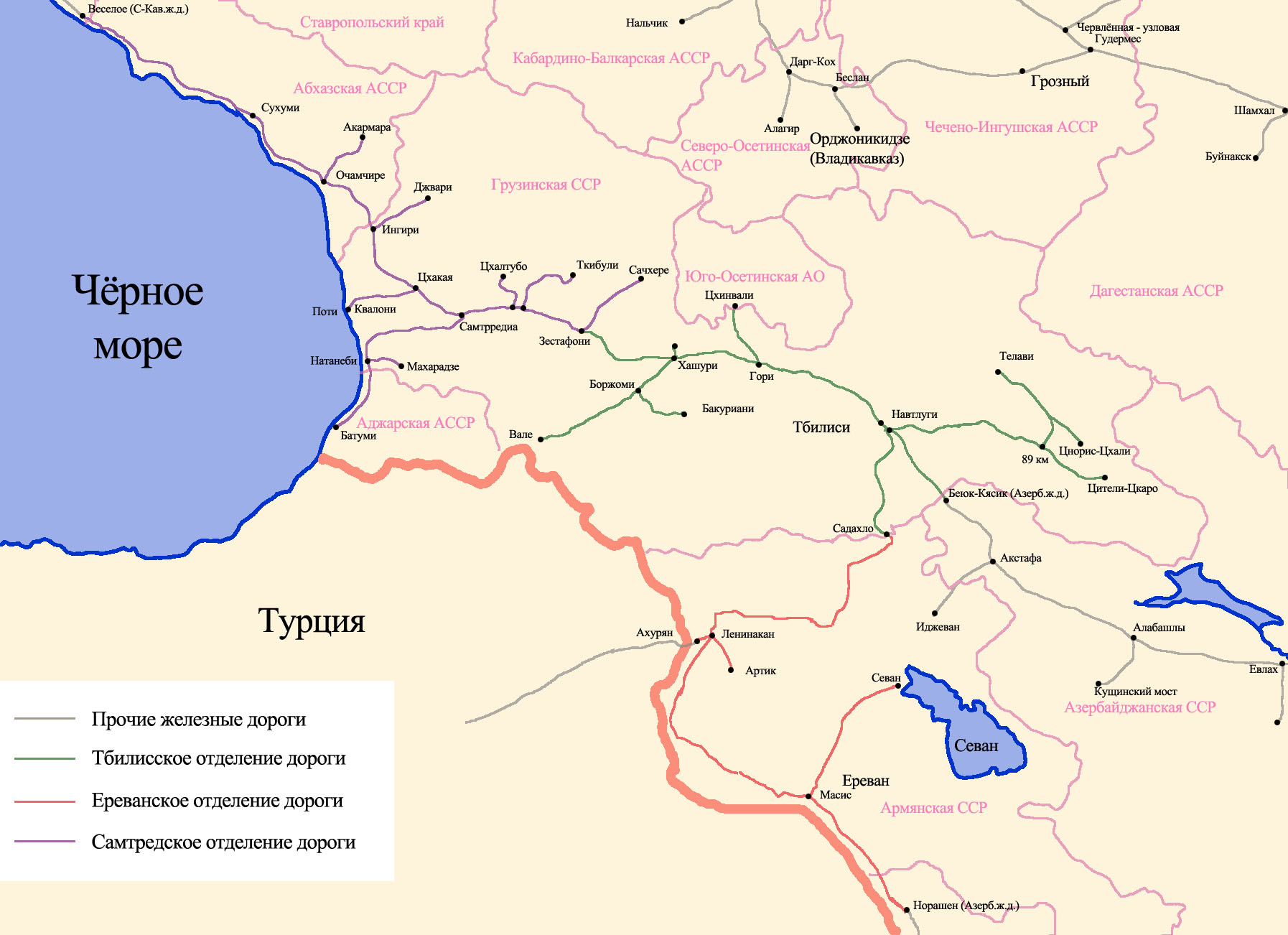 Схема Закавказской железной дороги по состоянию на 1 января 1967 года